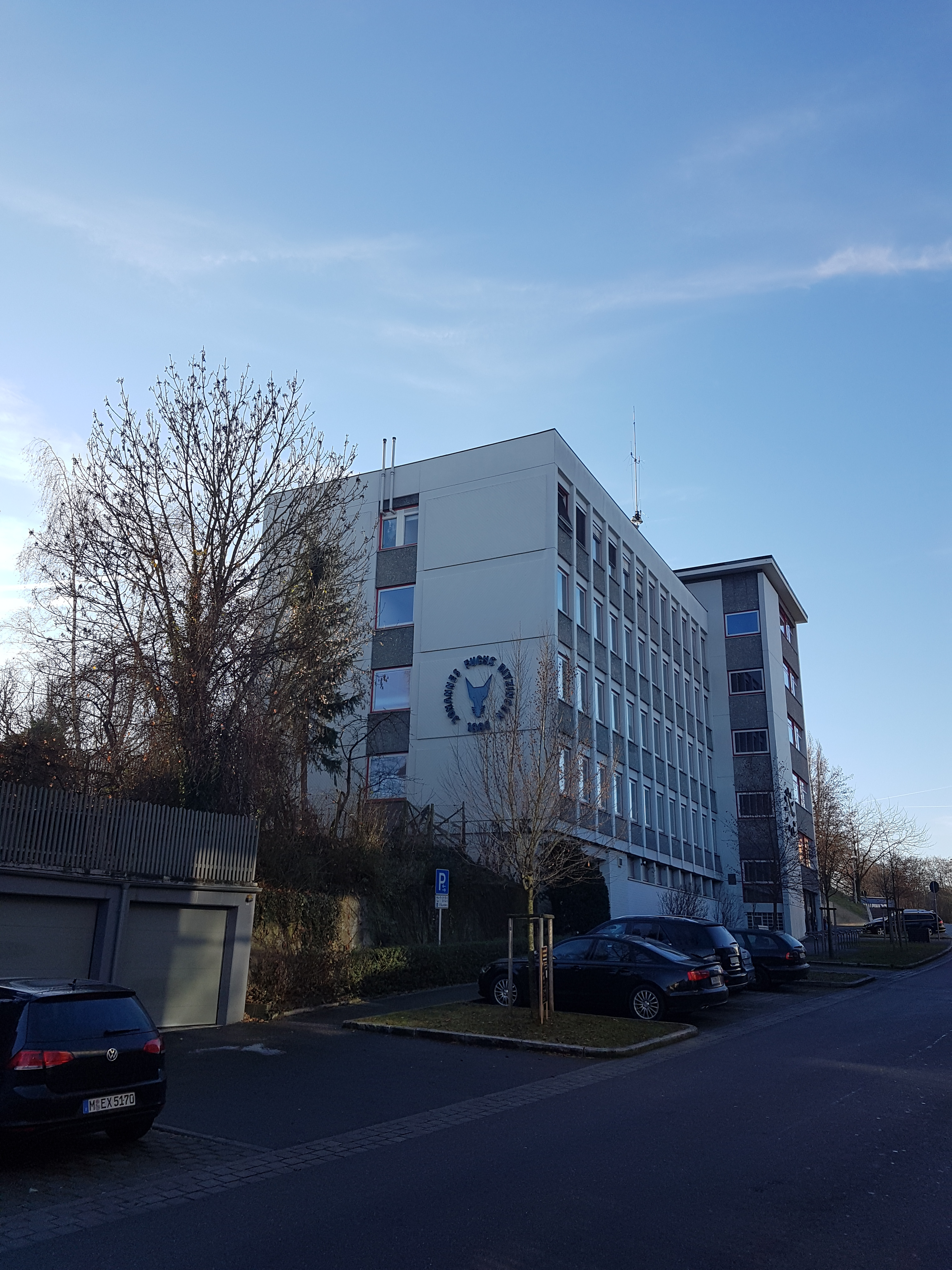 Ditzingen, Ehemaliges Verwaltungsgebäude der Johannes Fuchs KG an der Leonberger Straße